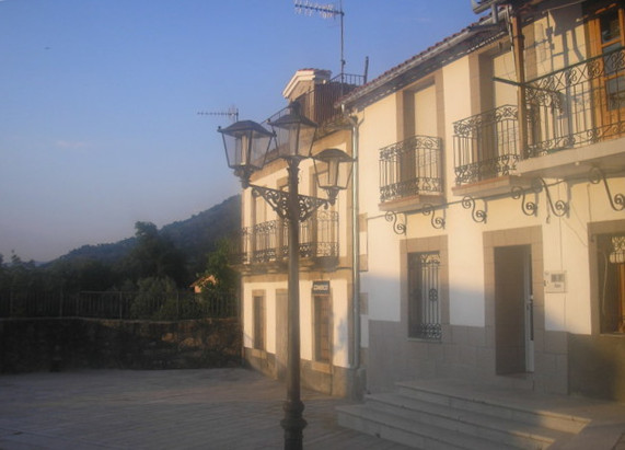 Es la mas representativa de las plazas de casas del monte(caceres).En ella se celebran todoas las actividades fesivas.